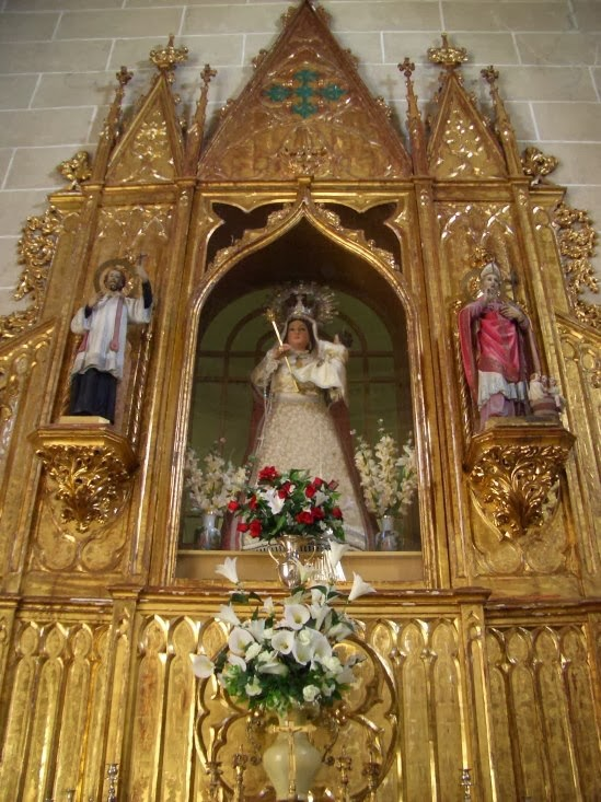 Virgen de Alcantara